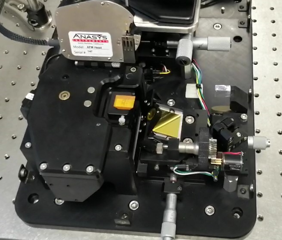 Technique inventer par Alexandre Dazzi et ses collaborateurs à l' Université Paris-Sud en 2005.